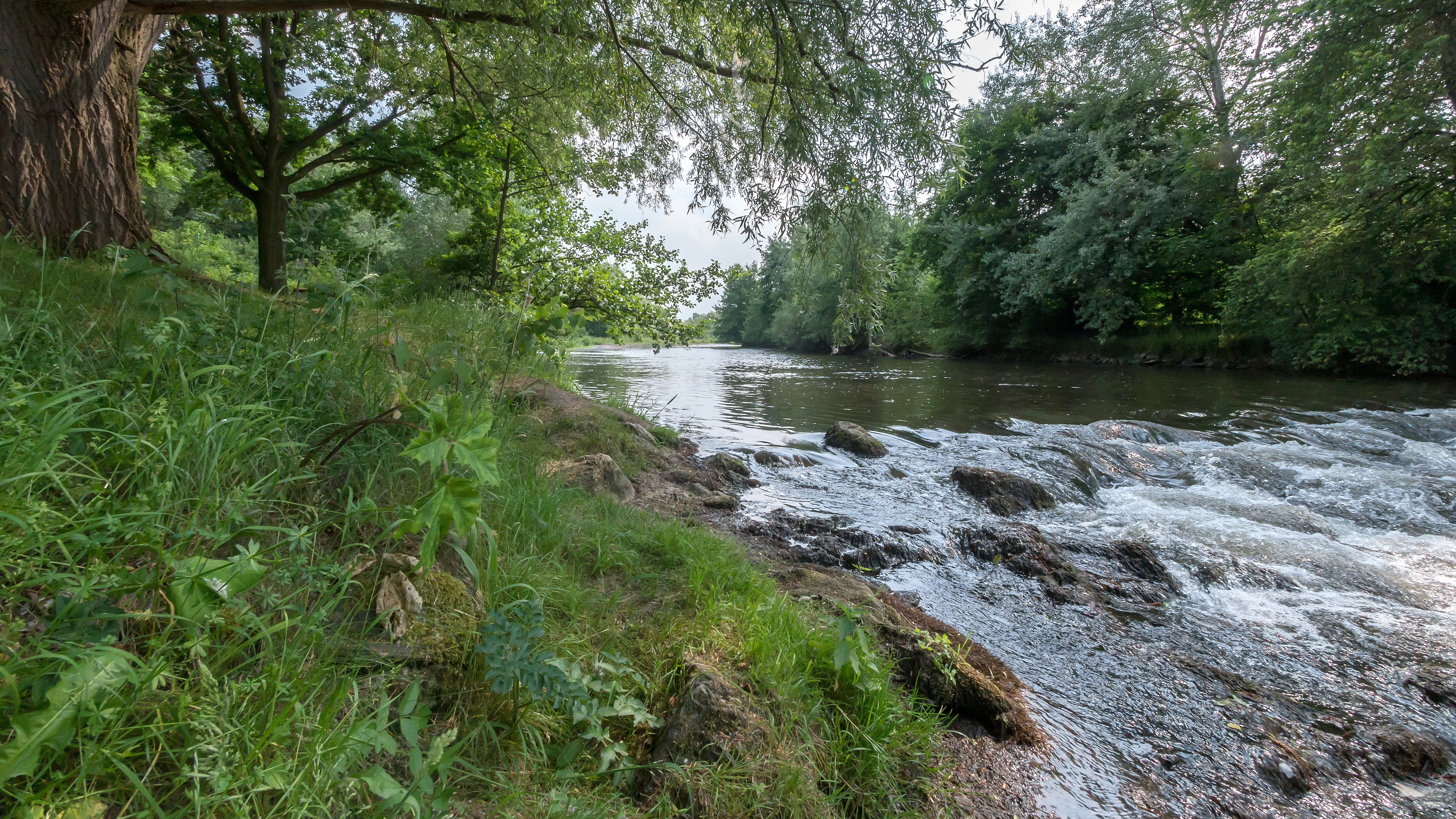 FFH-Gebiet Rur von Obermaubach bis Linnich WDPA ID 555520438 Rurwehr Jülich I